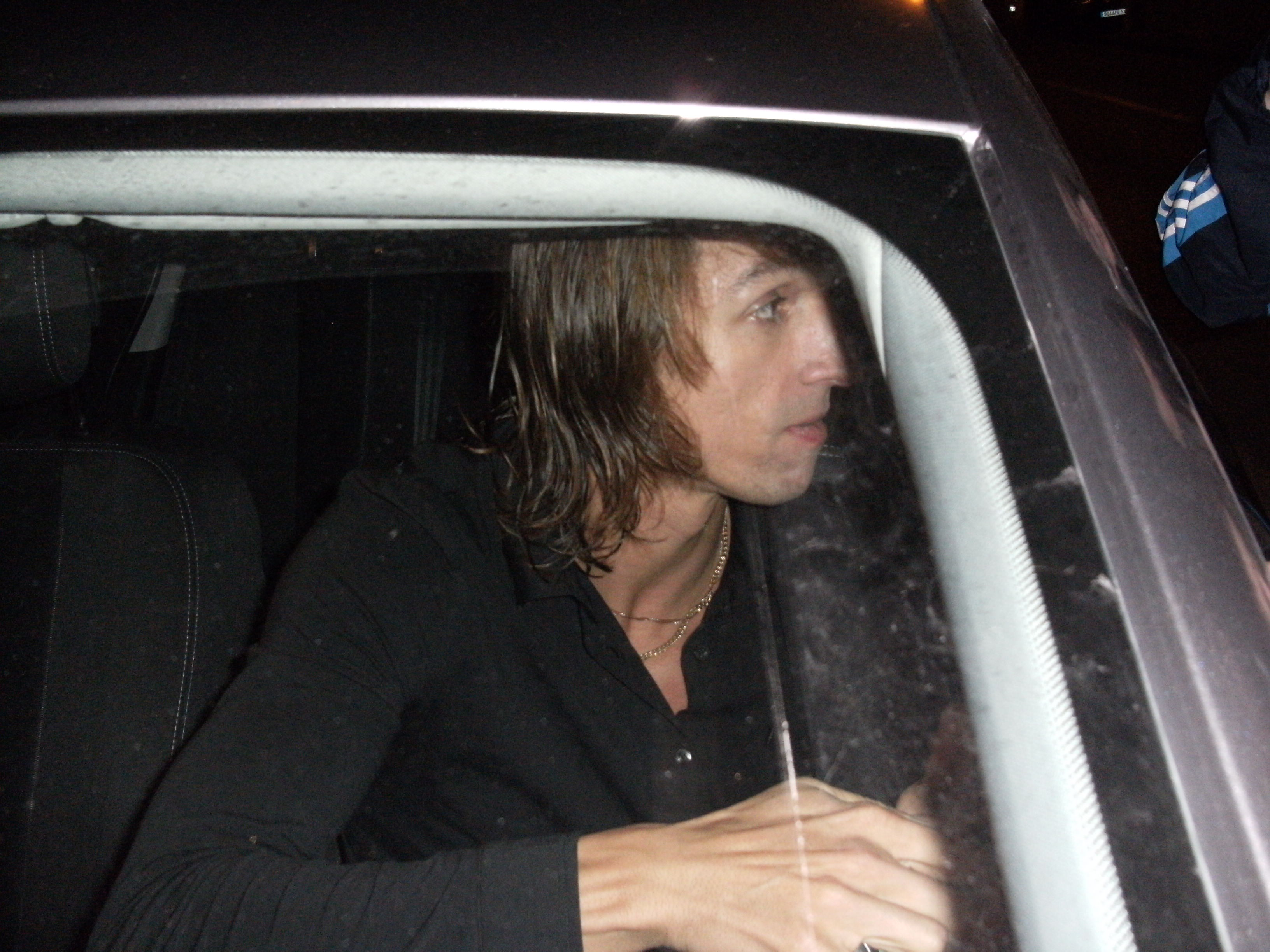 Elinton Andrade signant des autographes à la sortie du Centre d'entraînement Robert Louis-Dreyfus